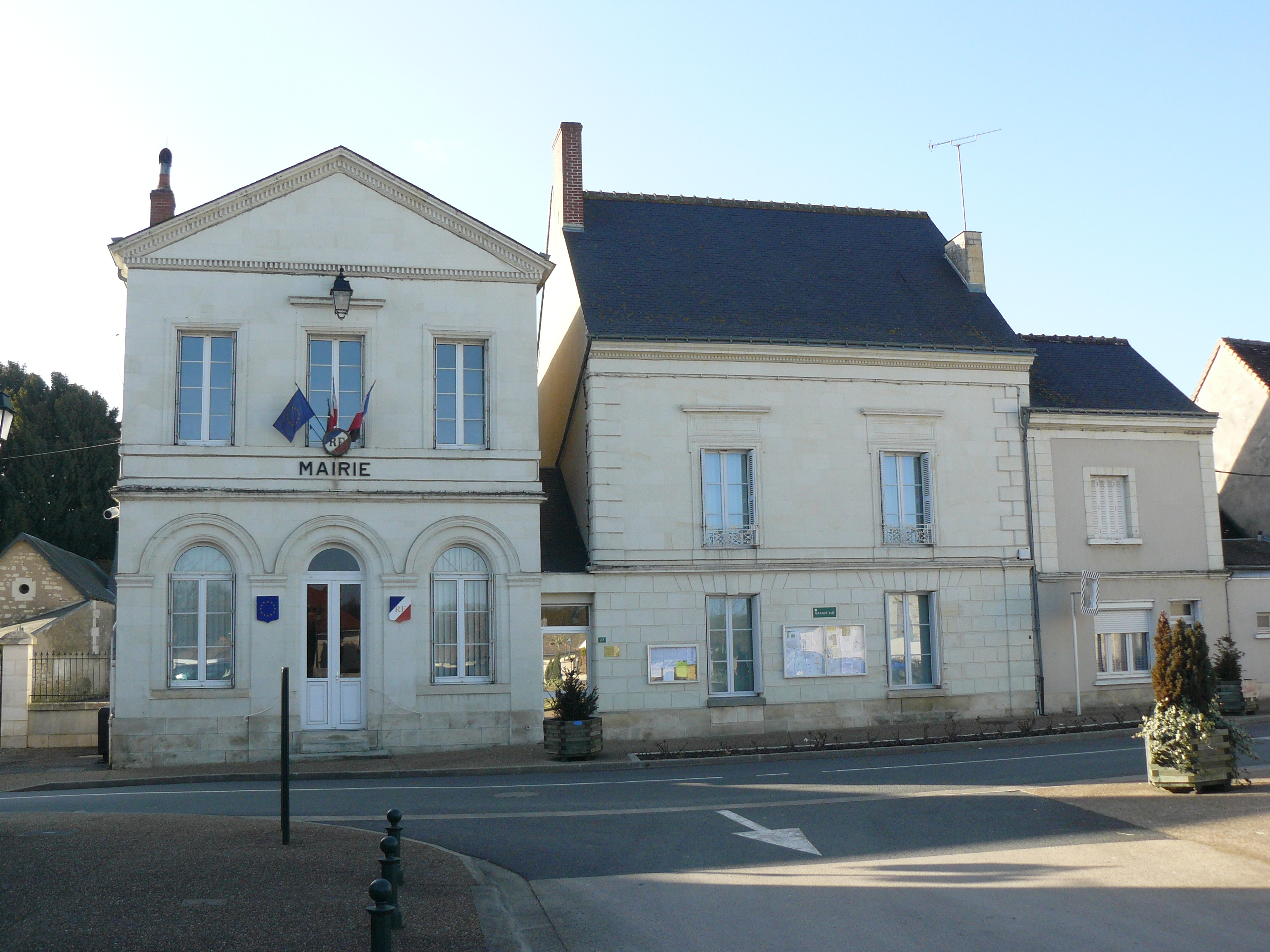 Mairie de Saint-Epain